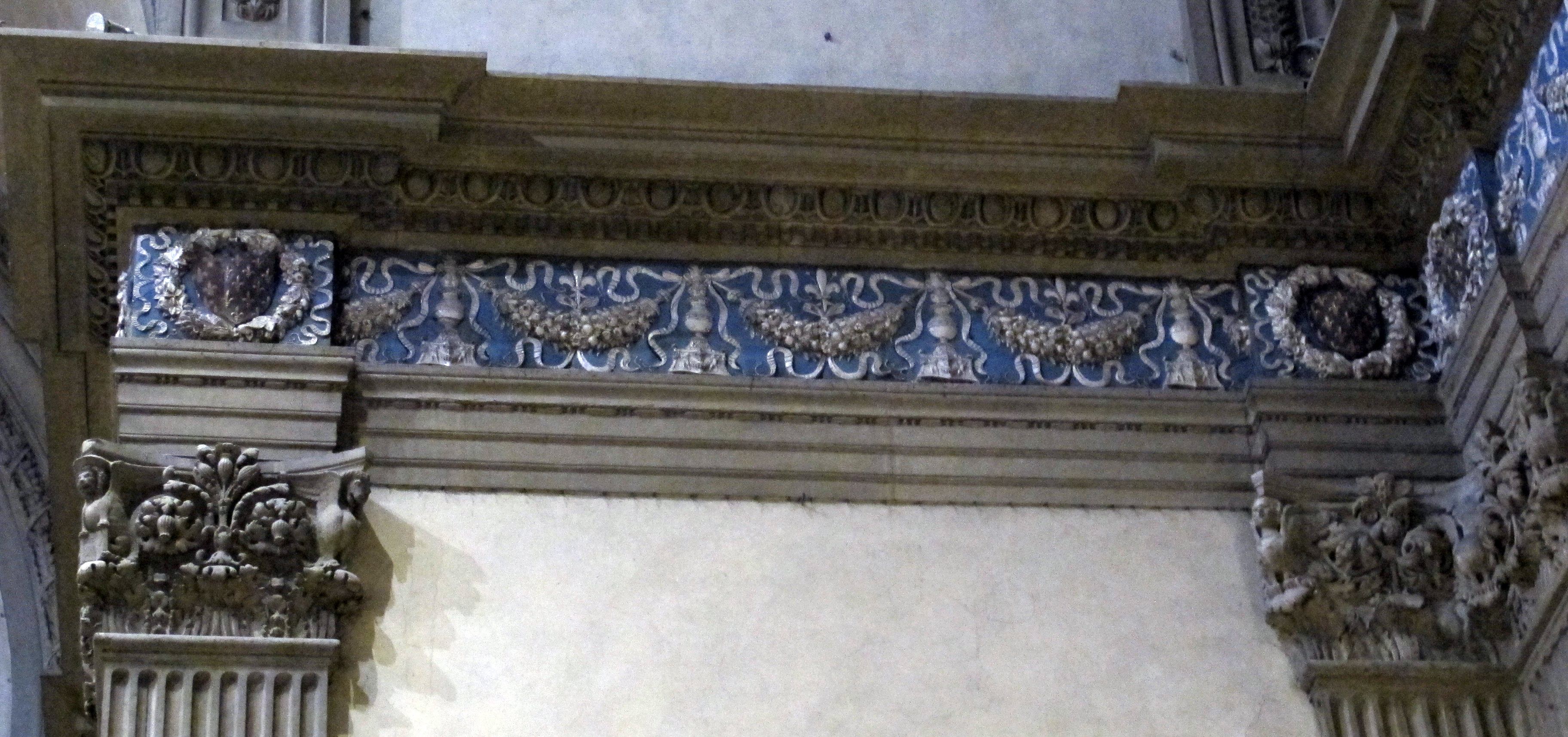 Santa Maria delle Carceri